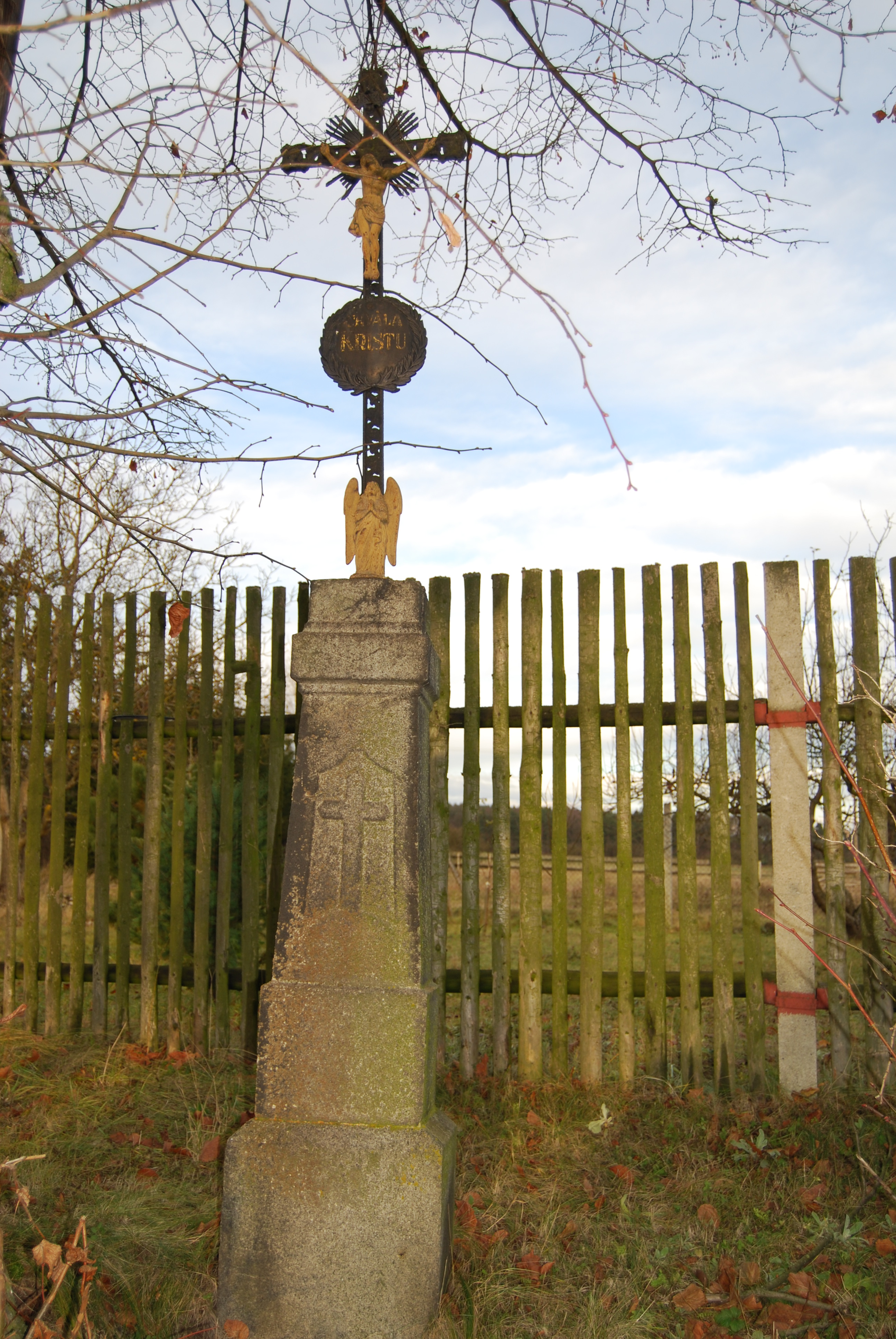 Kříž v obci. Svobodka je malá vesnice, část obce Myštice v okrese Strakonice. Česká republika.